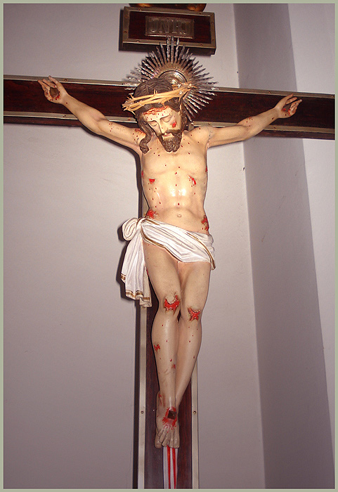 Interior da Capela Nosso senhor Jesus do Bom Fim, Porto Alegre, Brasil. Esta imagem é a que deu origem à devoção popular que construiu a capela